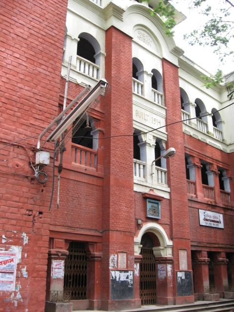 Oriental Seminary, Kolkata